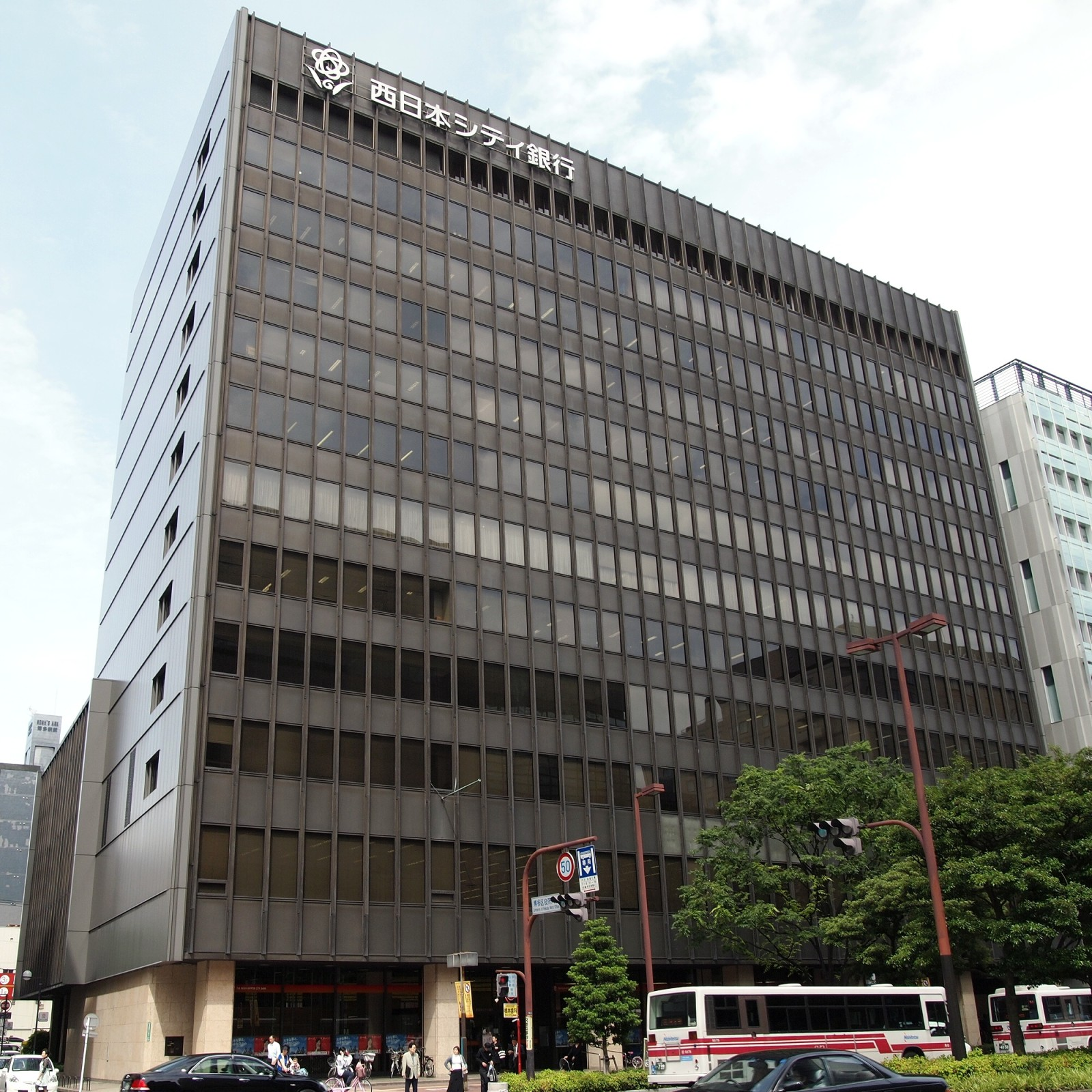 福岡市博多区 西日本シティ銀行本店別館（旧西日本銀行本店） ZonerPhotoStudio11にて各種補正済み